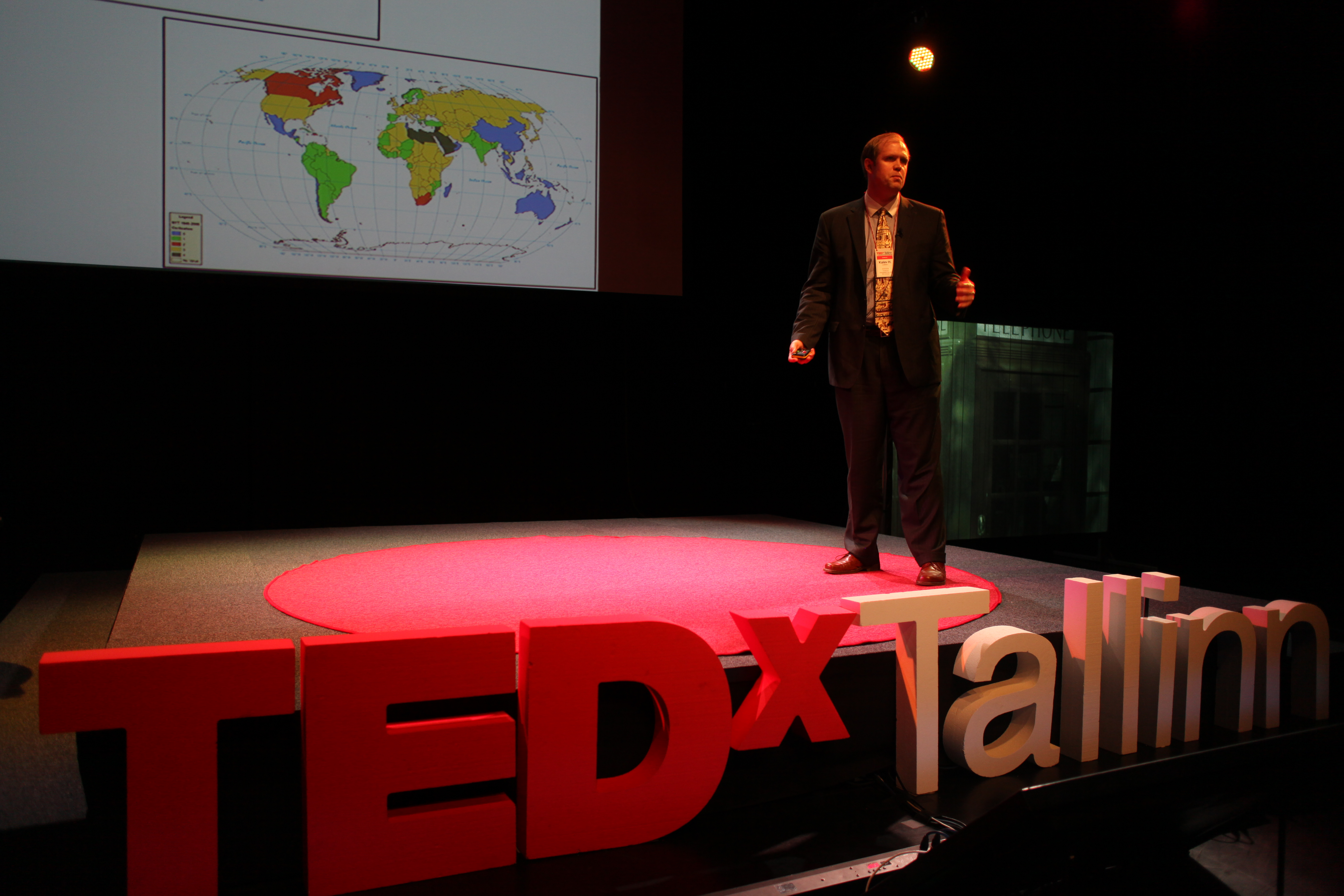 Kalev H. Leetaru esinemas TEDxTallinn konverentsil 2012. aastal.